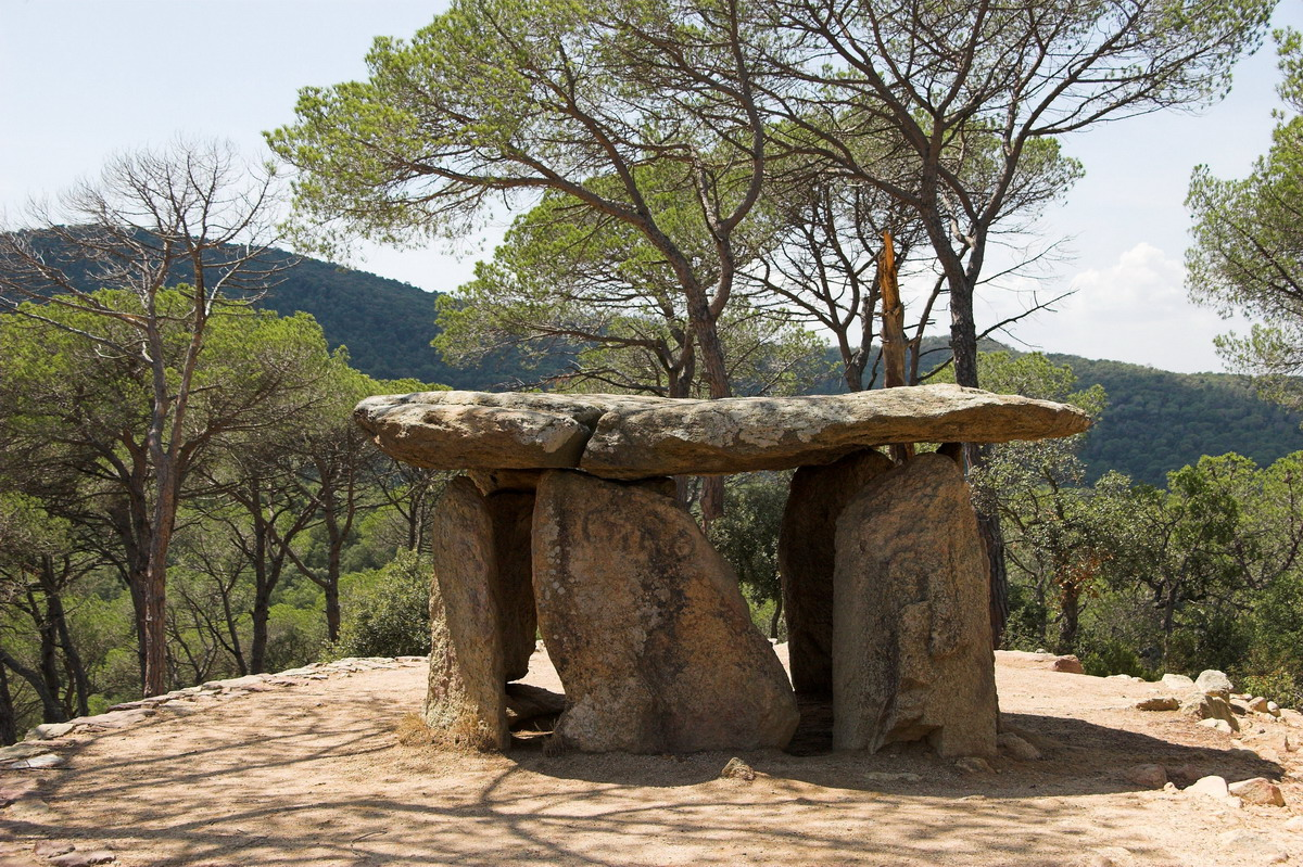 Dolmen de la Pedra Gentil (Vallgorguina, Vallès Oriental, Catalunya, Espanya).